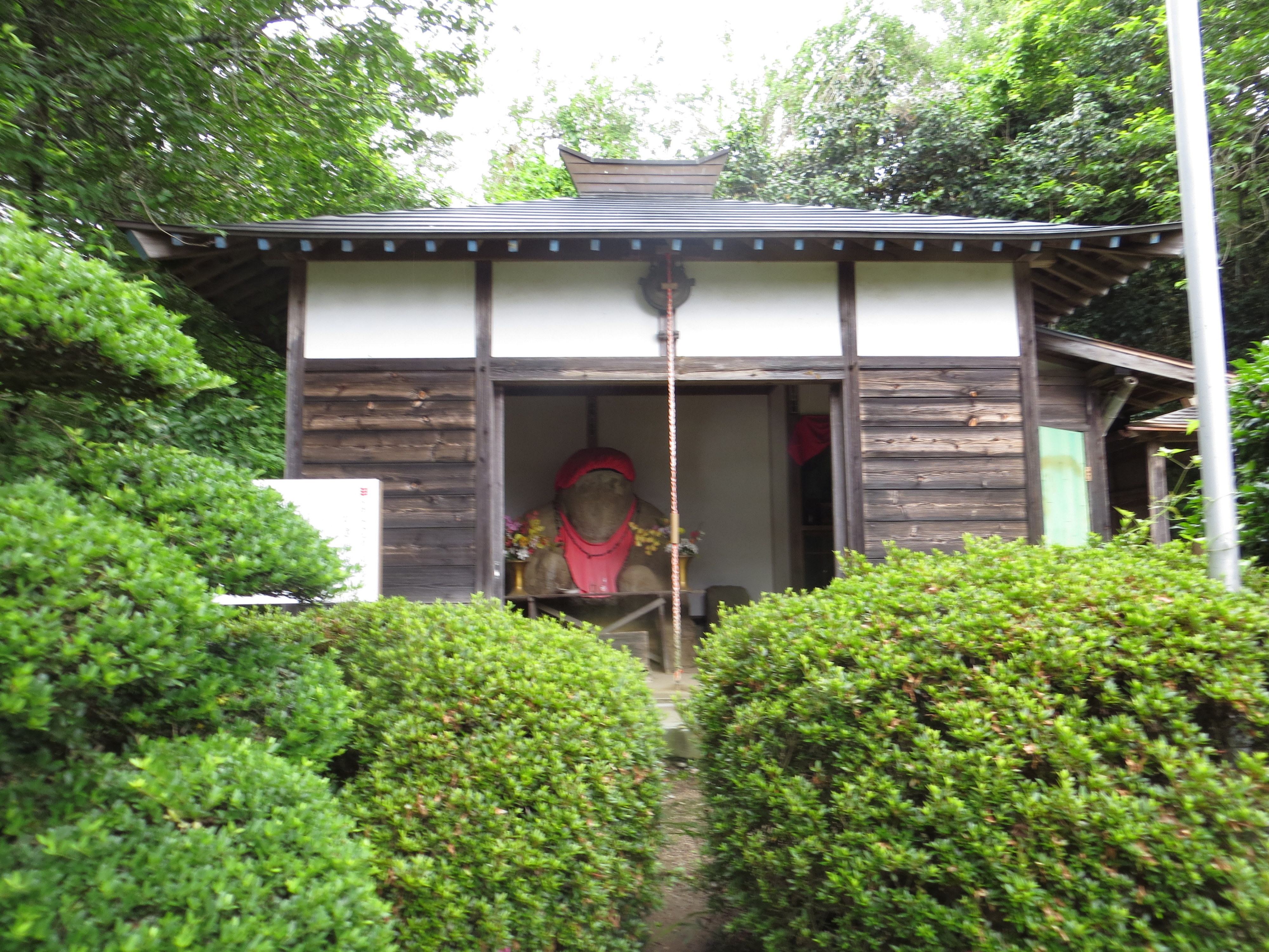 汗かき地蔵